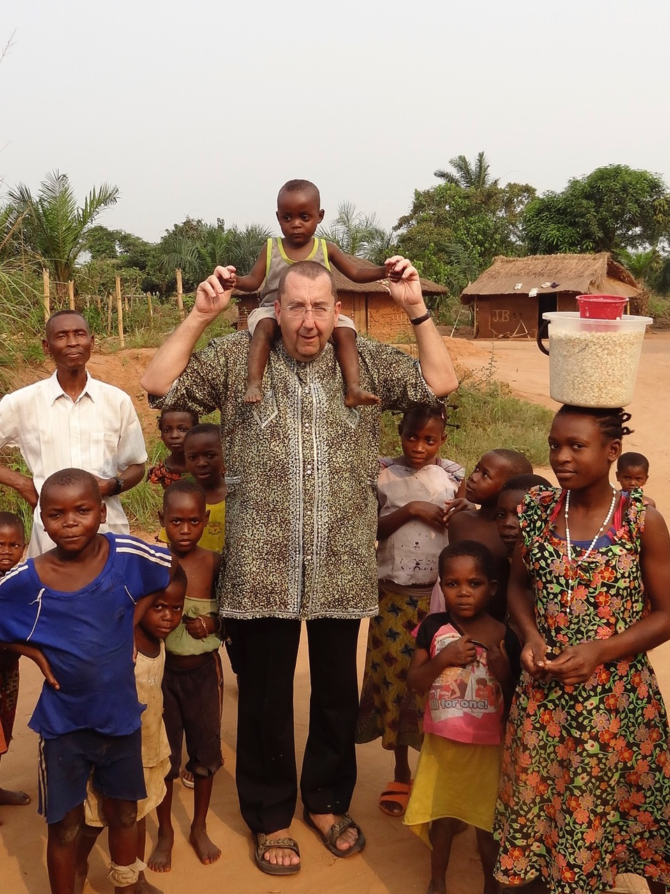 Chanoine Guy Luisier (1961-)